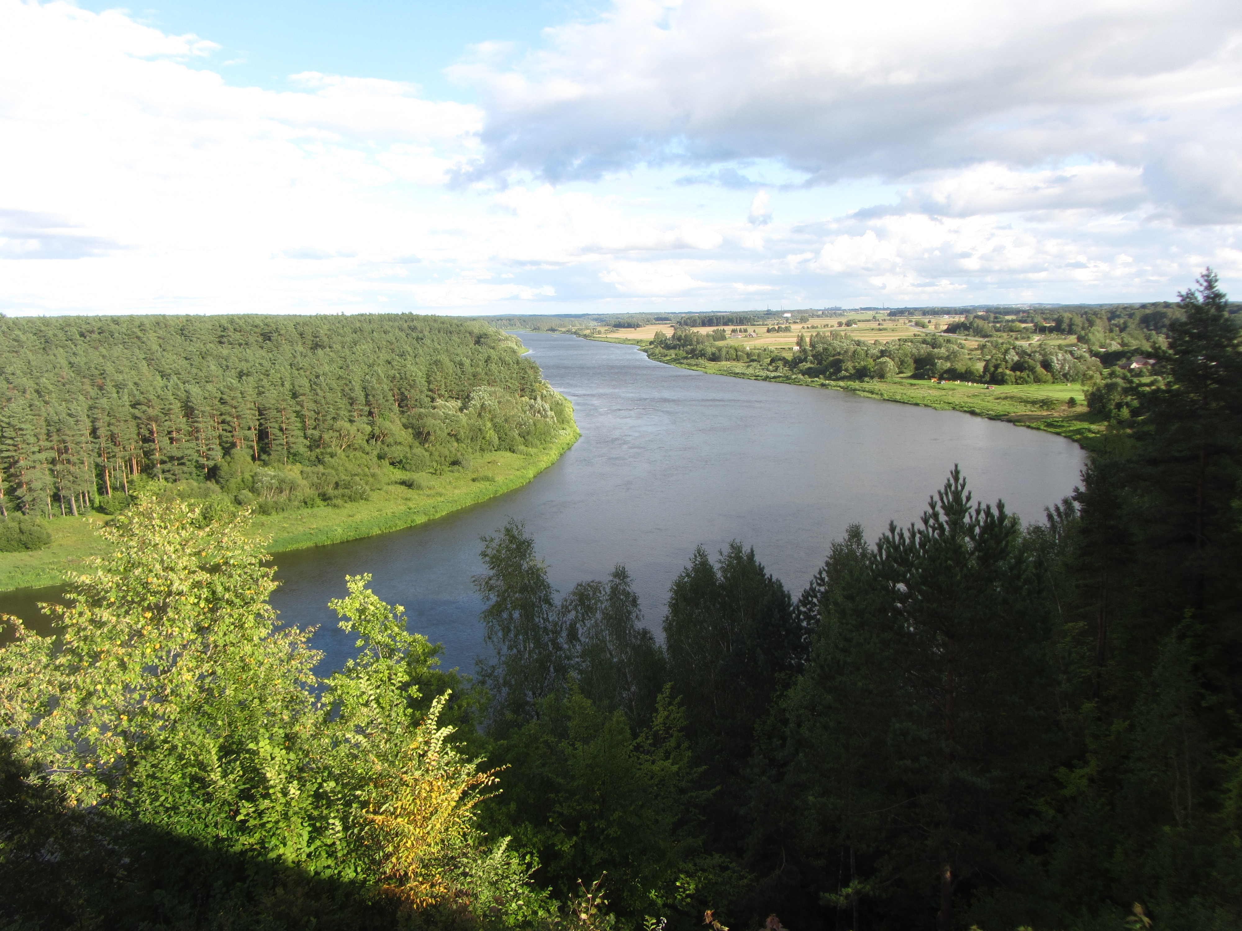 Balbieriškio sen., Lithuania